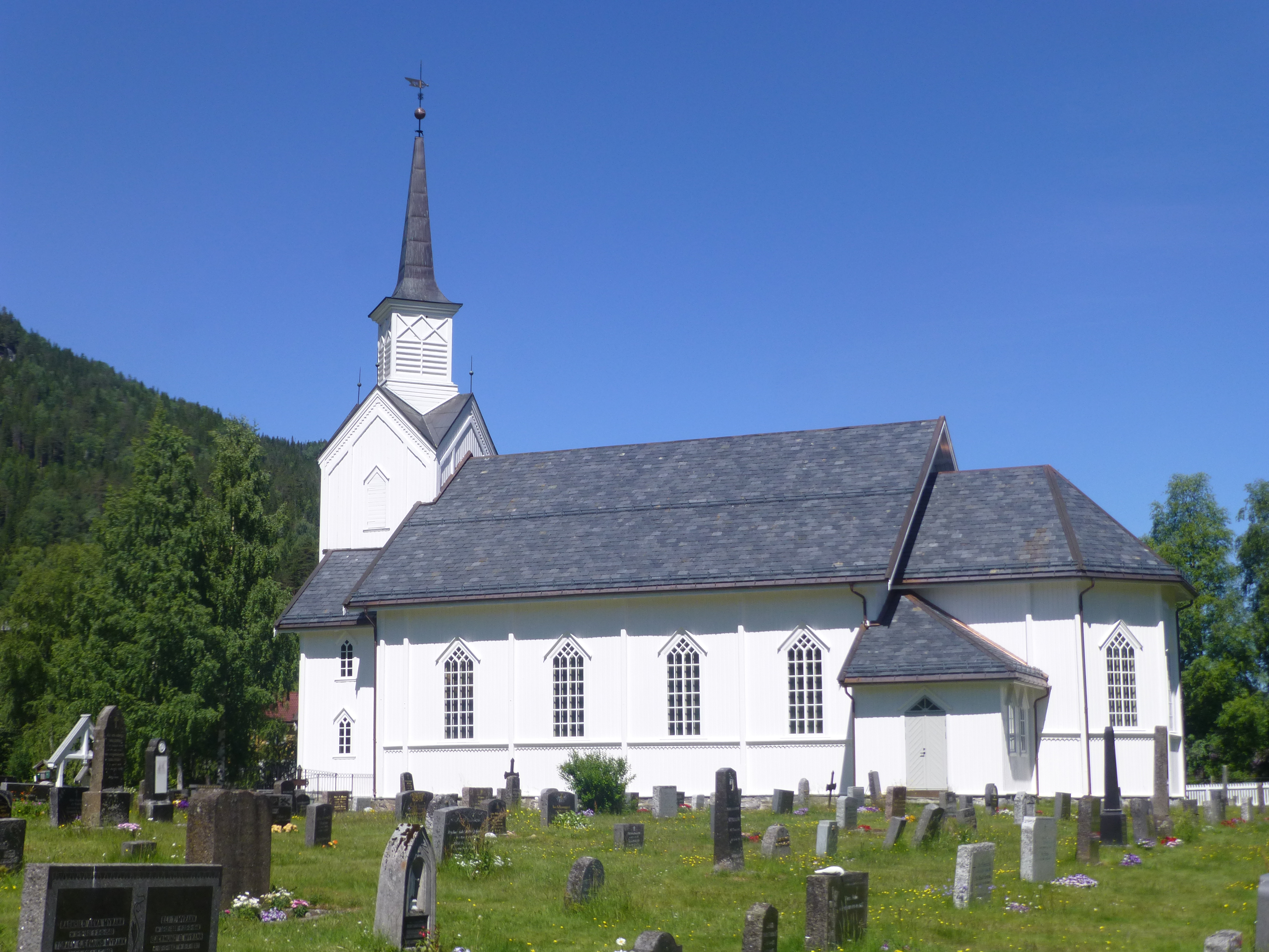 Nore kirke i Nore i Nore og Uvdal kommune i Buskerud.